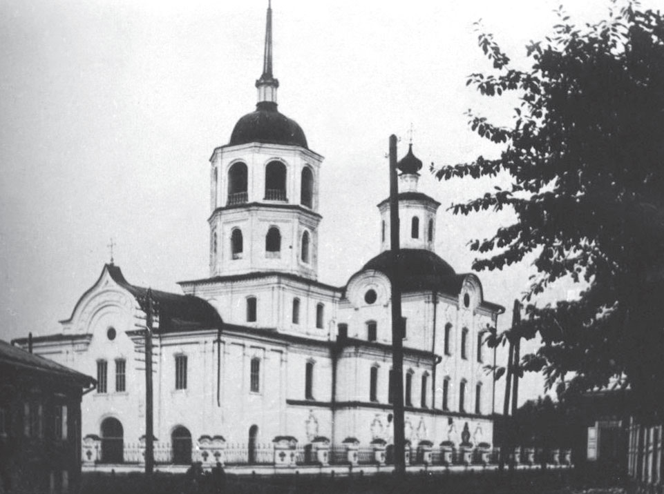 г. Иркутск. Харлампиевская церковь. Из коллекции С. И. Медведева.